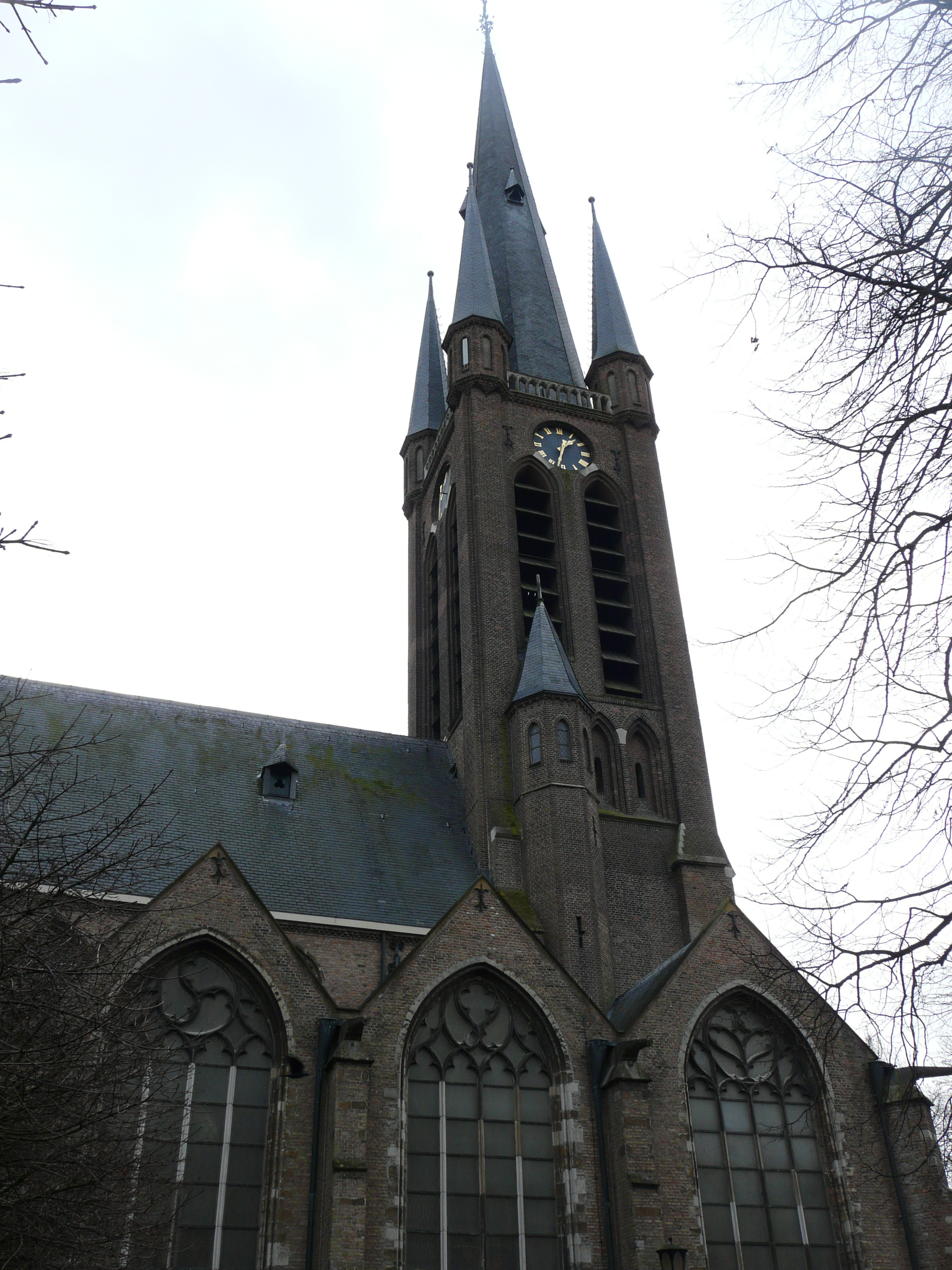 Zicht op een deel van de Sint Martinuskerk in wijk Princenhage in Breda